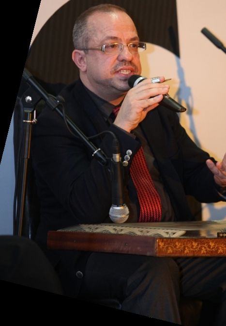 Göksel Baktagir ve Yurdal Tokcan